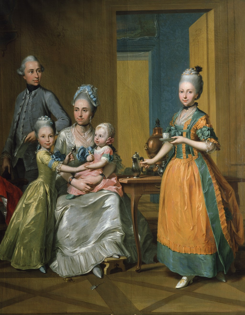 Frau von Borries mit vier Kindern (Fragment).